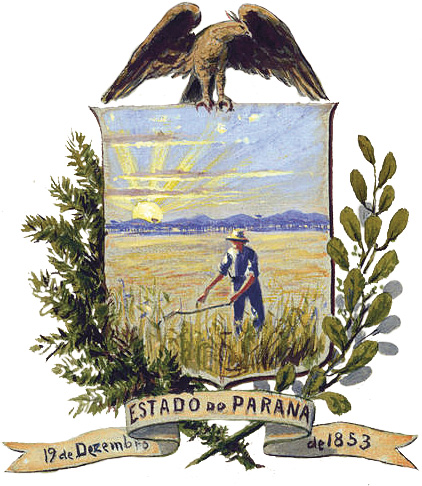 Brasão do Paraná idealizado por Alfredo Andersen.